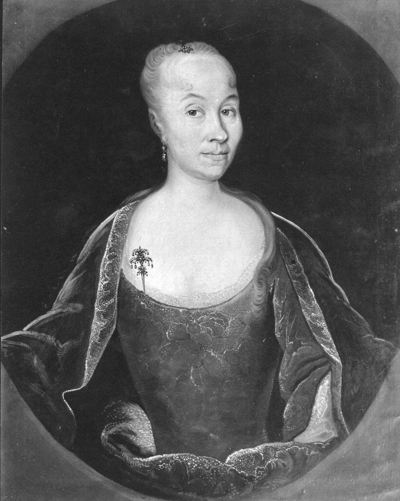 Anne Marie Flor Ziegler (1682-1755) ca. 1720